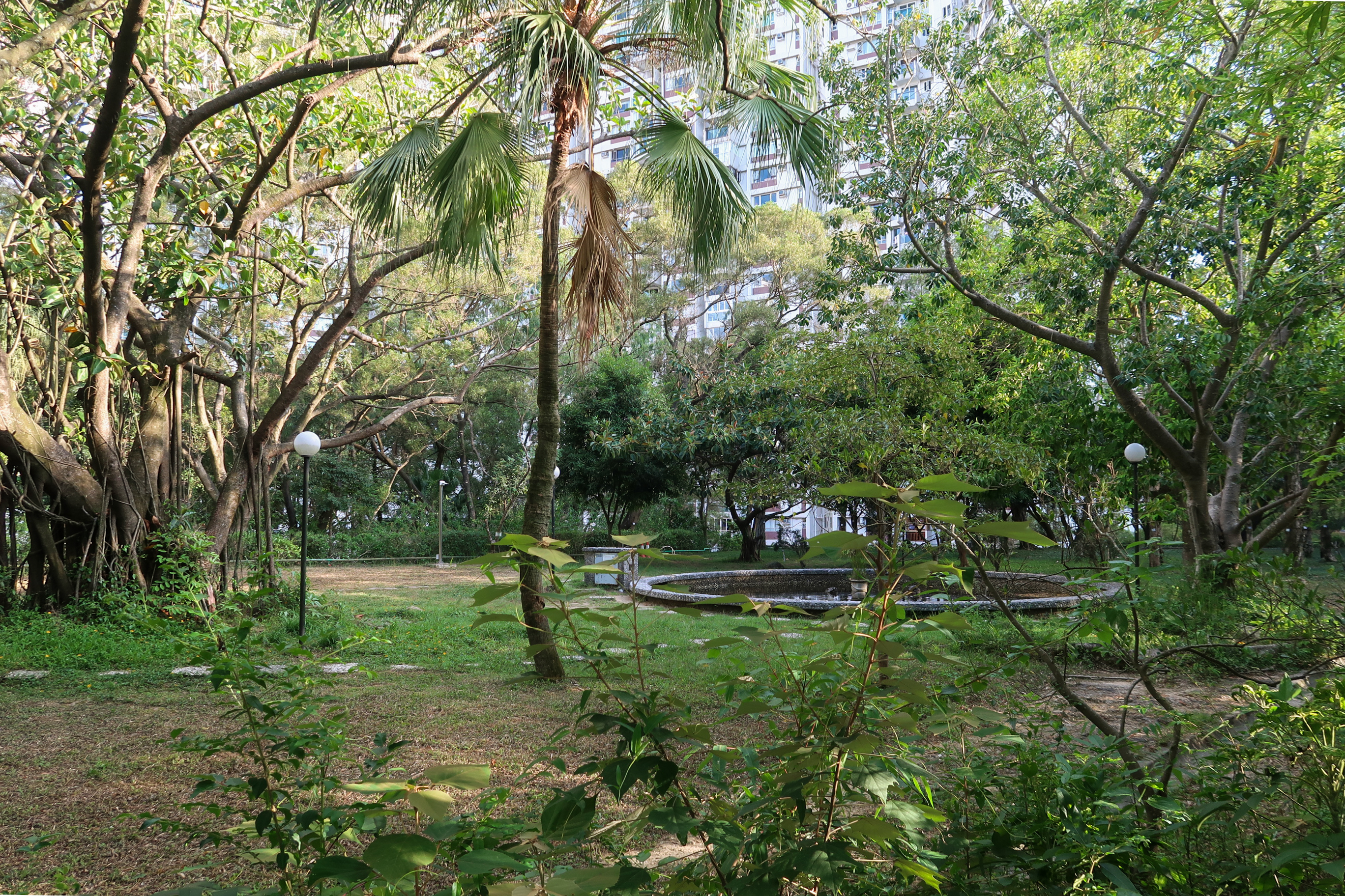 Braemar Hill Mansion Garden